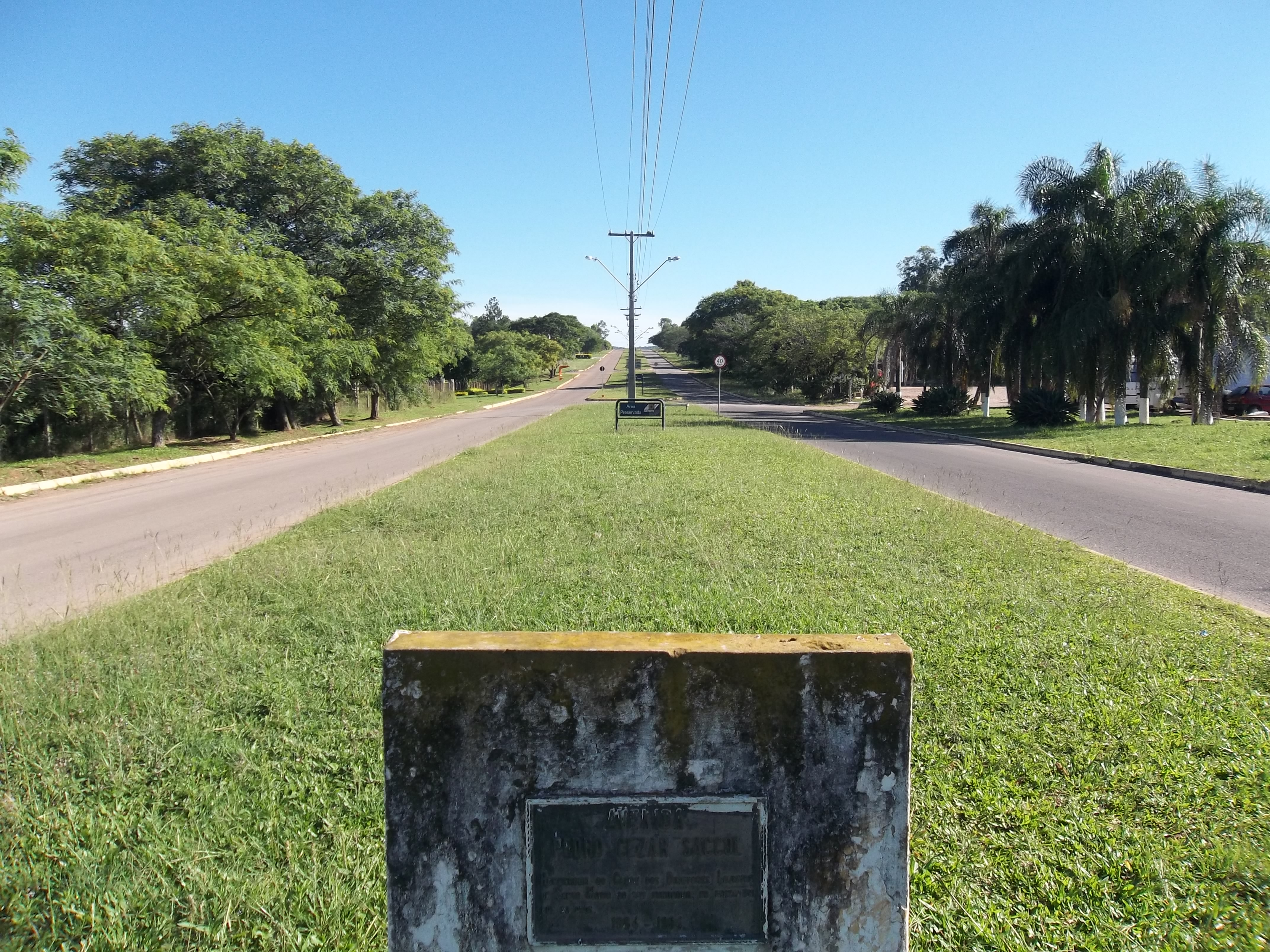 Avenida Pedro Cezar Saccol. Agroindustrial. Sede. Santa Maria. Rio Grande do Sul. Brasil